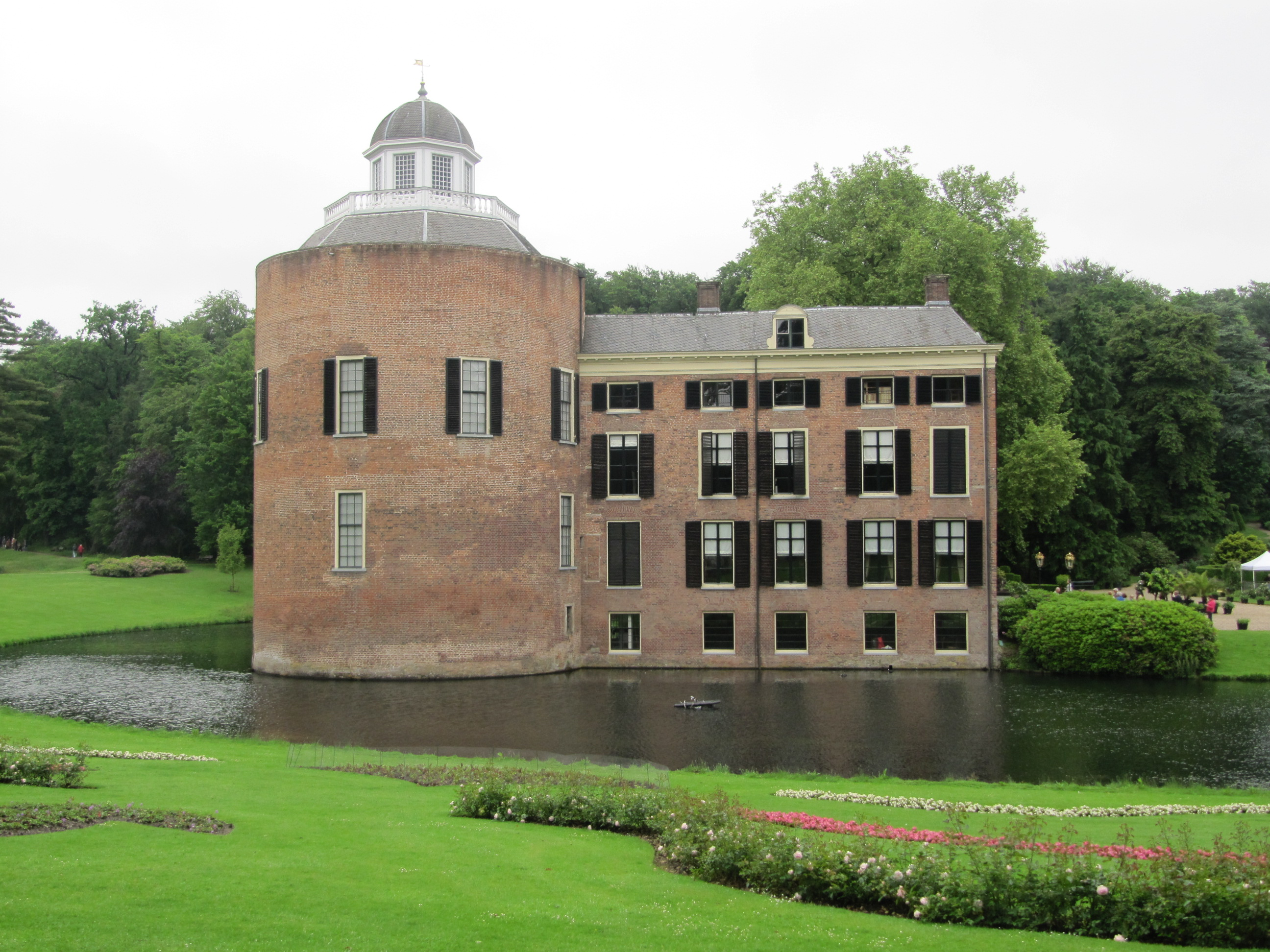 Kasteel en landgoed Rosendael